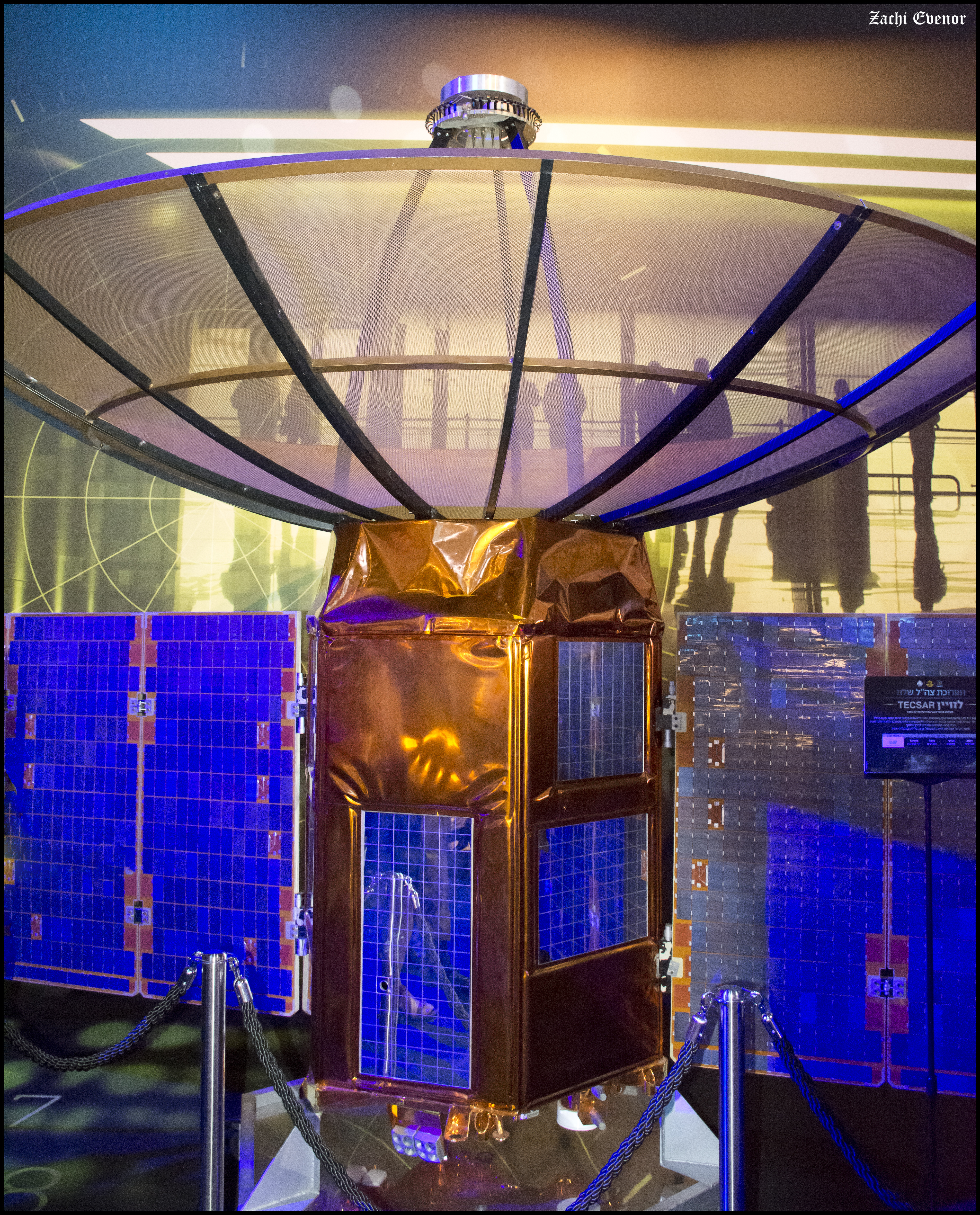 TECSAR spy satellite, Our IDF 70, Israel לוויין ריגול ותצפית טכסאר, תערוכת צה"ל שלנו 70, ישראל